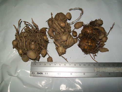 Rizomas (Raiges o jengibres) de K. Rotunda